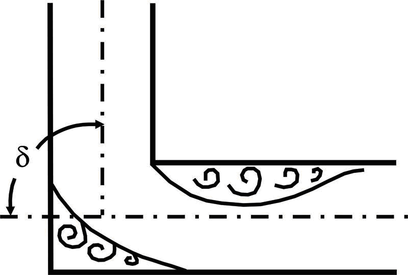 Коліно труби (схема)